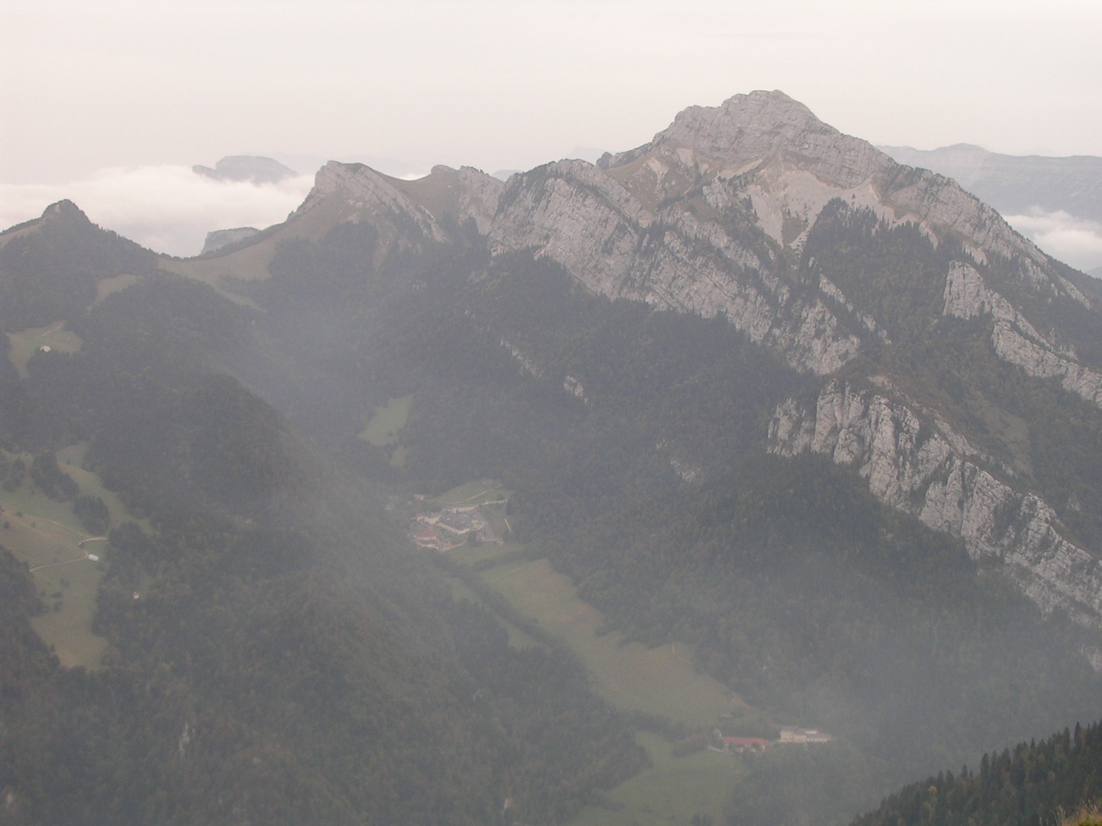 On aperçoit le monastère de la Grande Chartreuse, au centre my own photograph